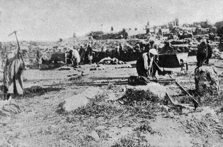 Timgad fouilles